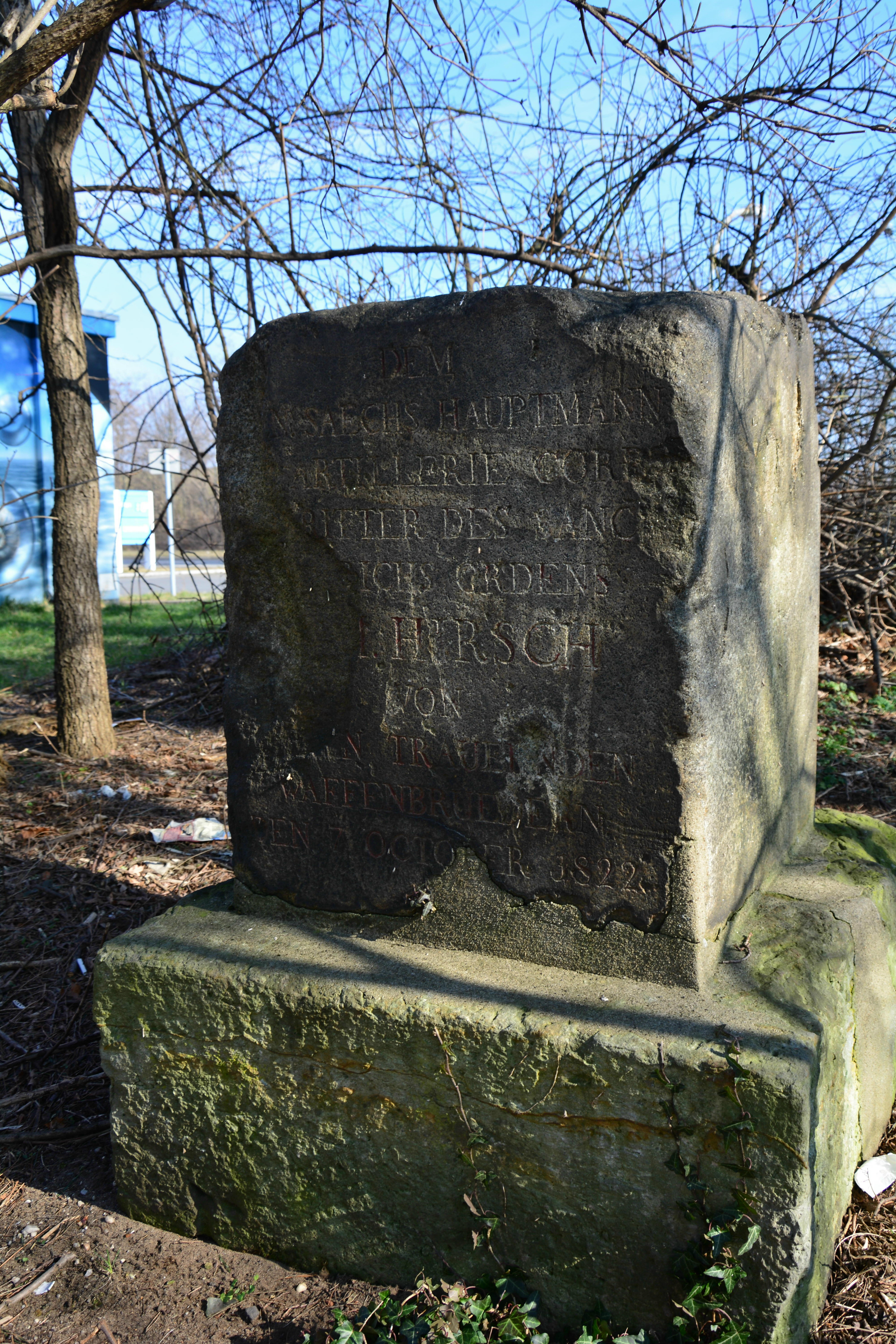 Dresden, Hauptmann Hirsch-Denkmal Zustand 21.2.2018